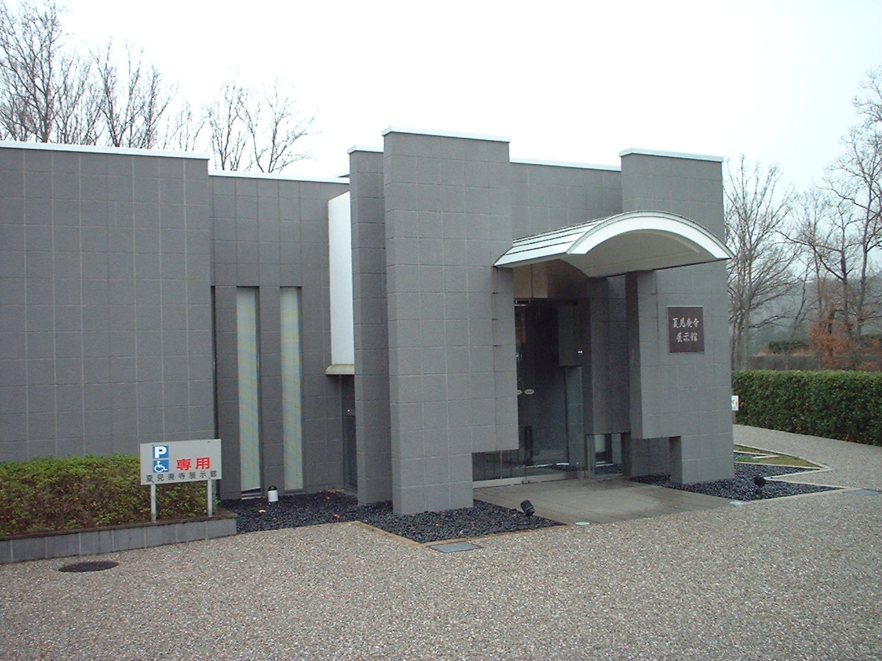 Natsumi Templesite Exhibition Museum